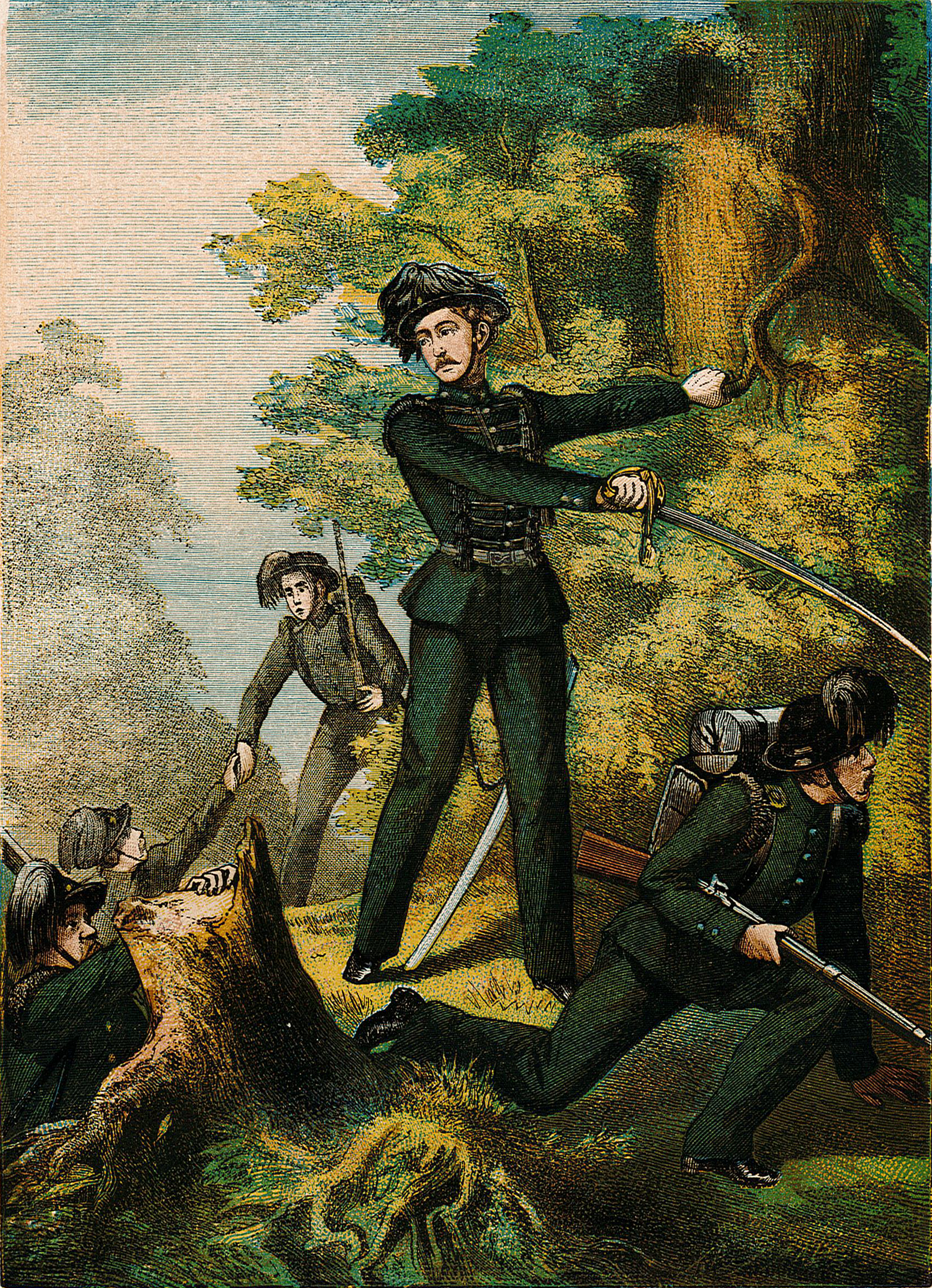 Uniformer Wermlands Fältjägare-Regemente